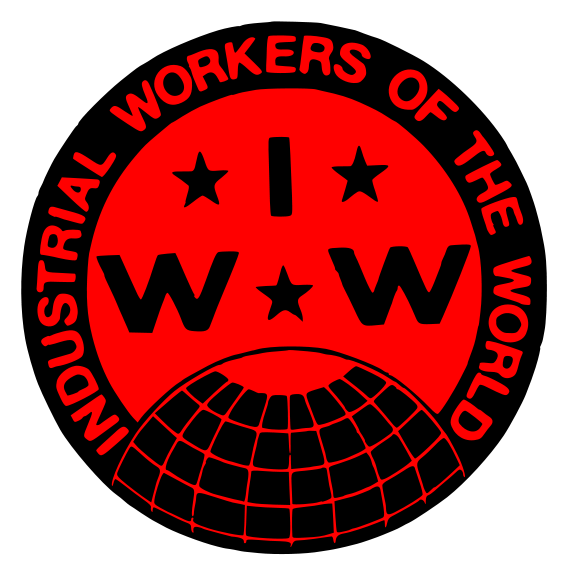 asding